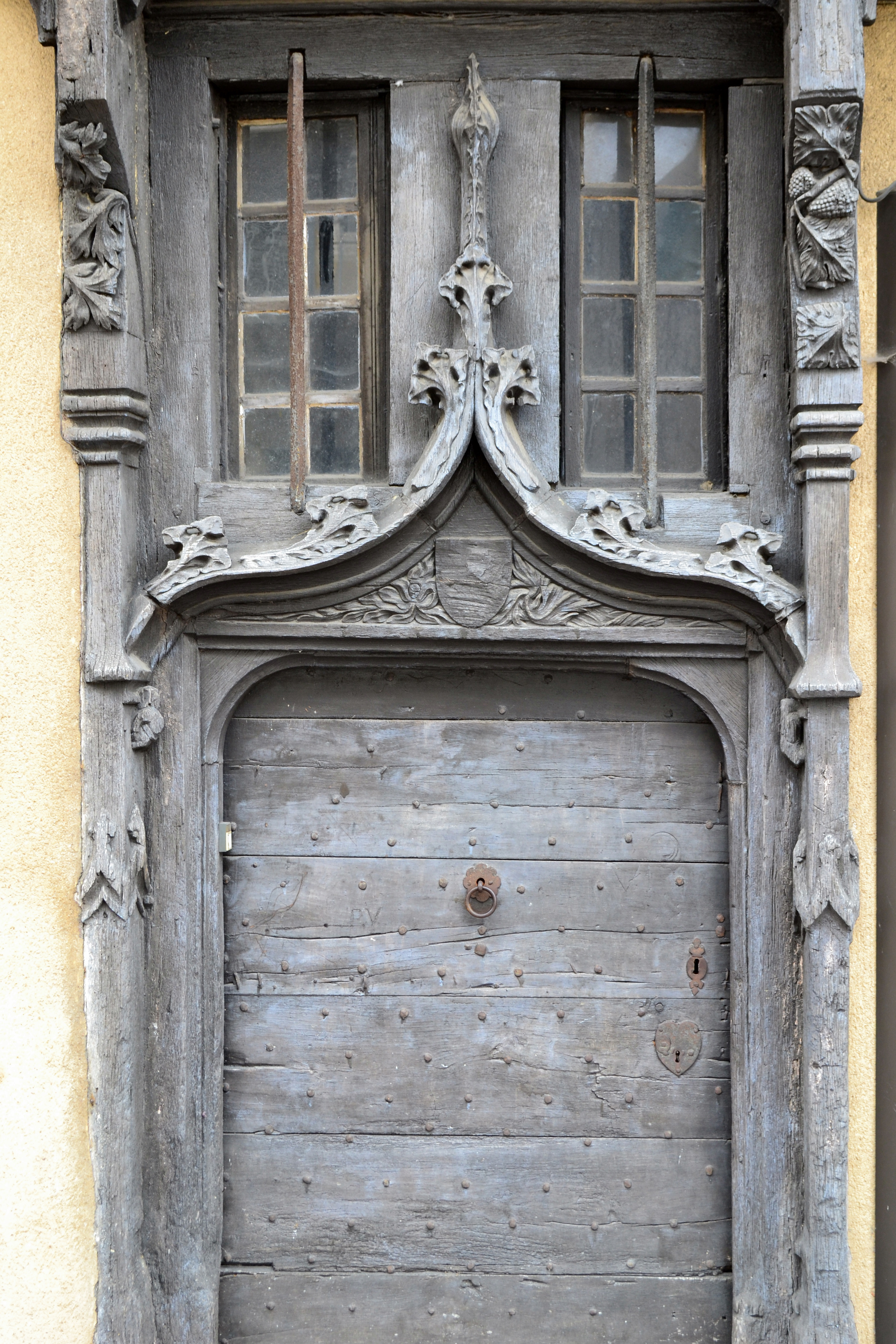 Porte de la maison à pans de bois de la place Laisnel de la Salle, ancienne place du Pavé, La Châtre (Indre)